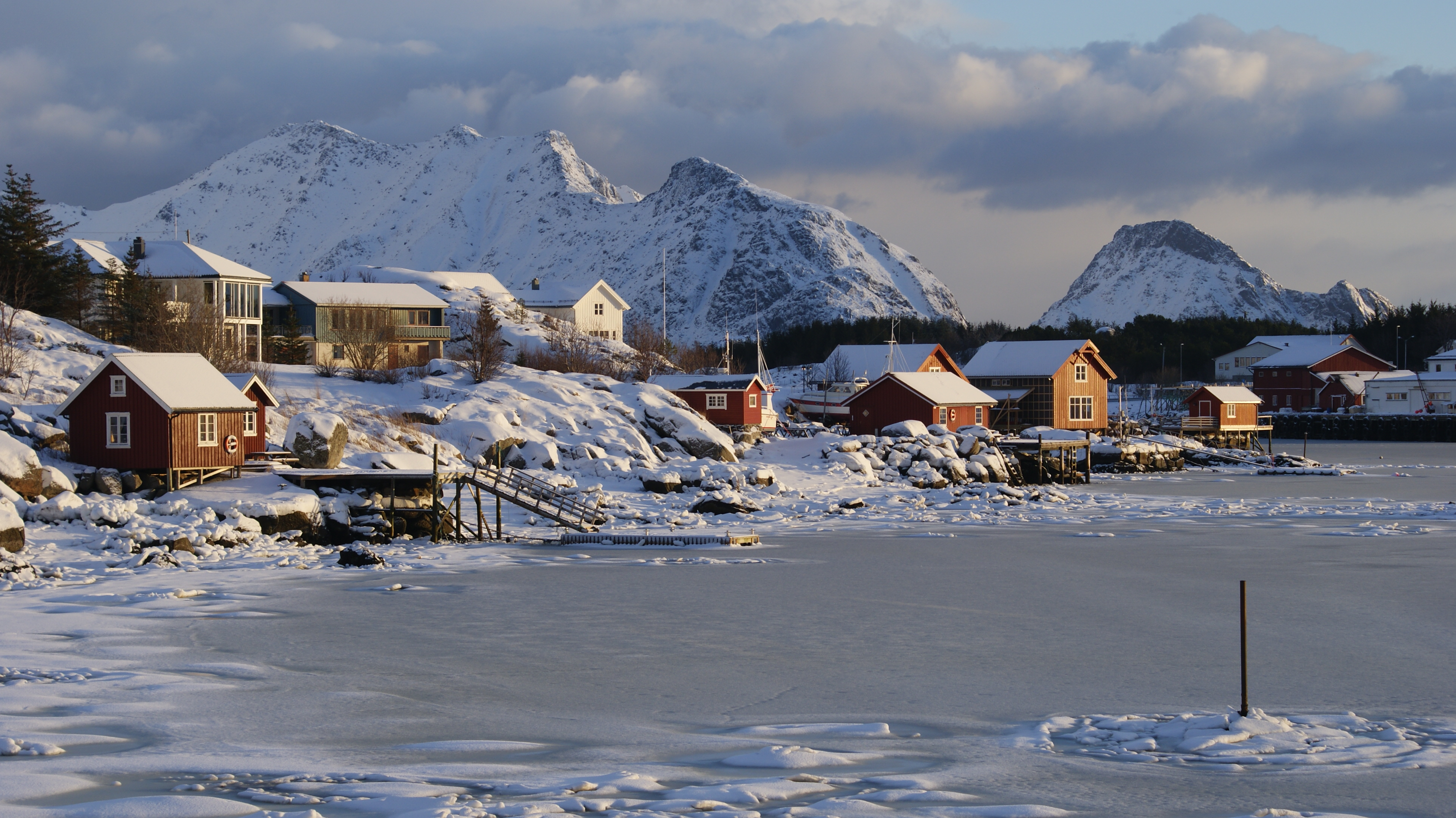 Ballstad, Vestvågøya, Lofoten, Norway.